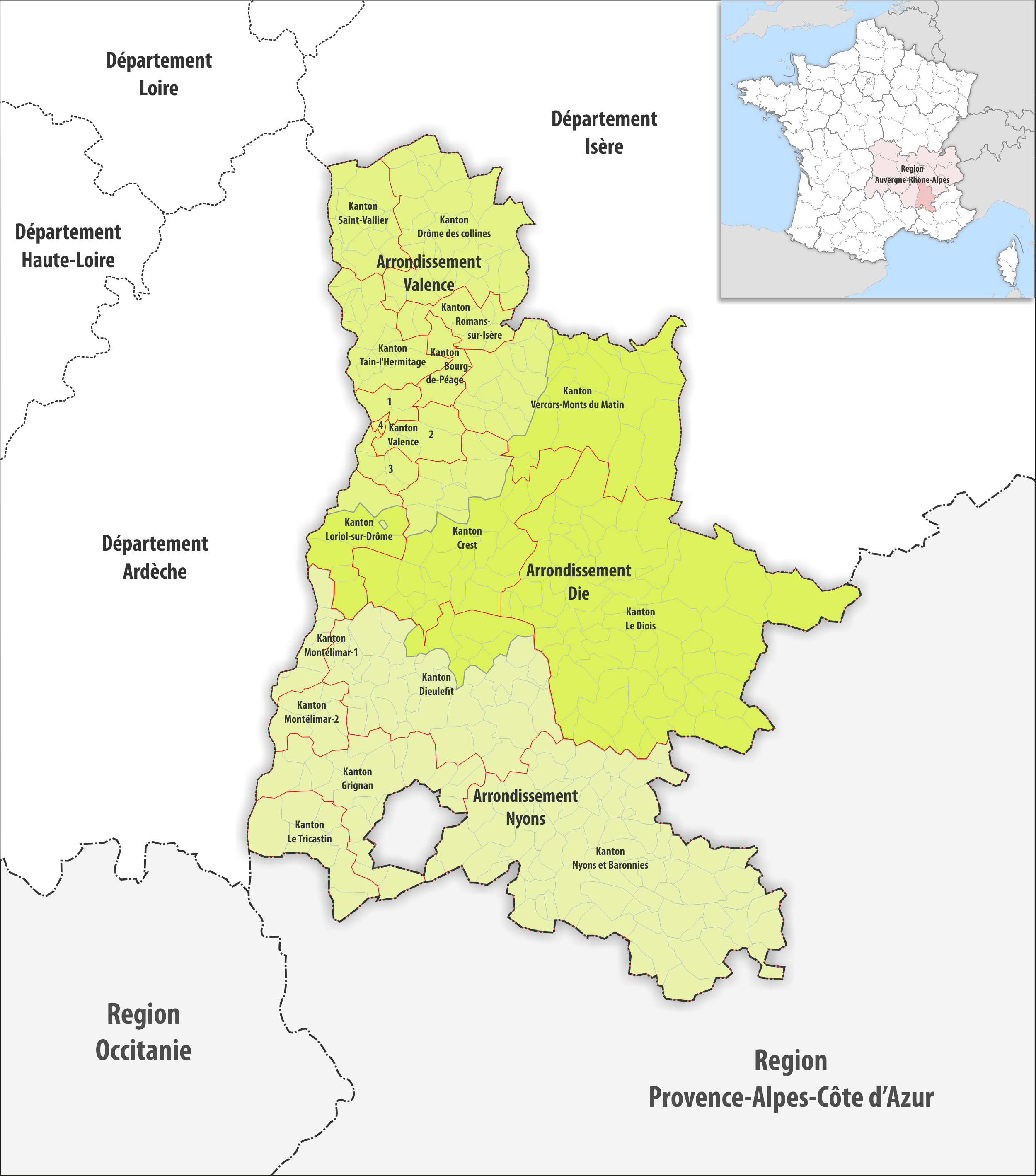 Gemeinden, Kantone und Arrondissemente im Departement Drôme